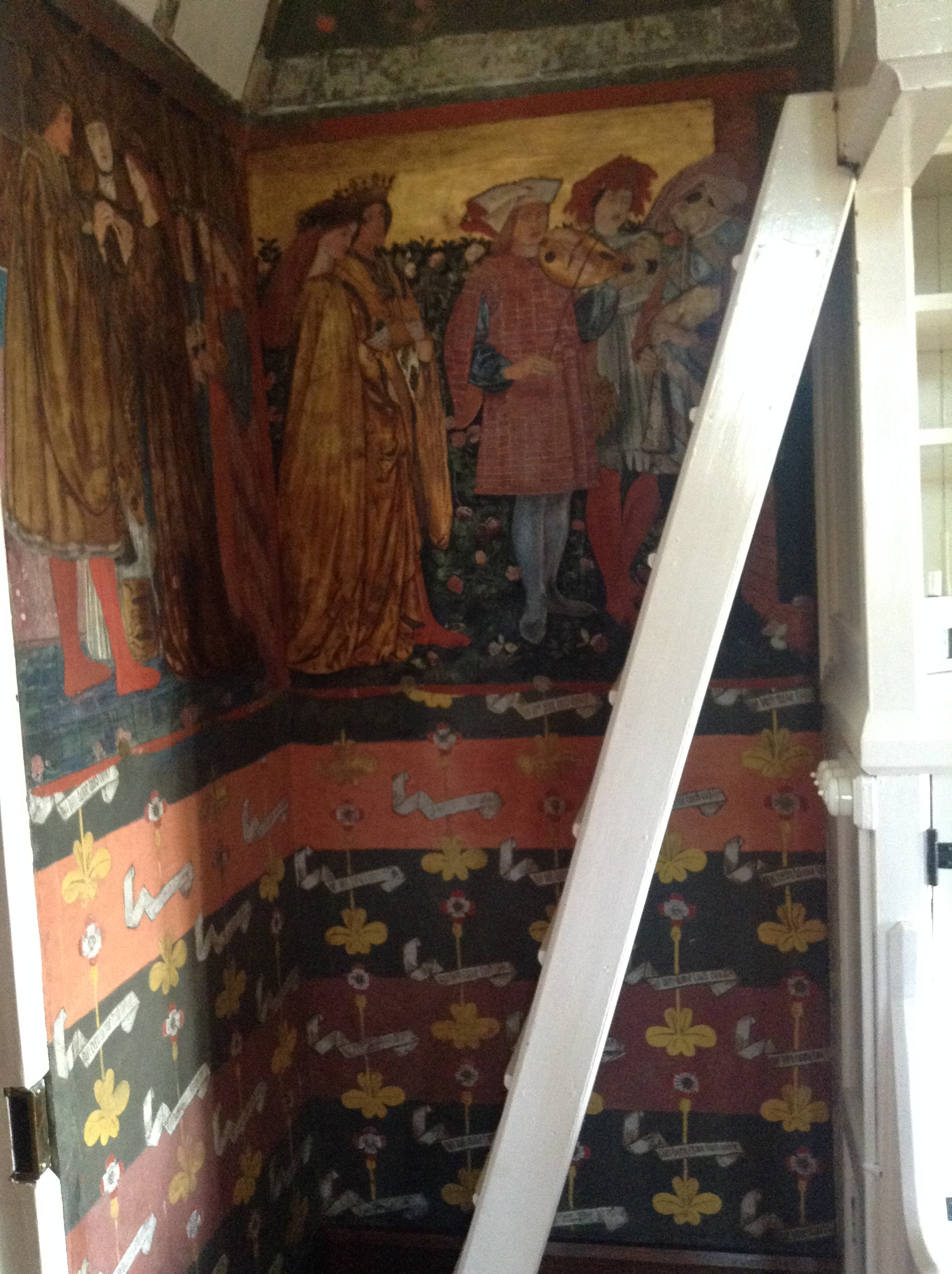 Murluniau yn Y Tŷ Coch yn 2015